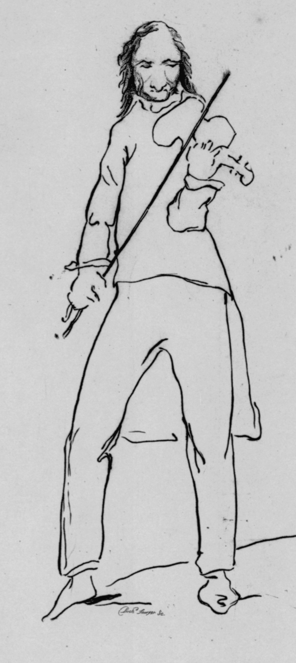 Niccolò Paganini, Drawing, Detail